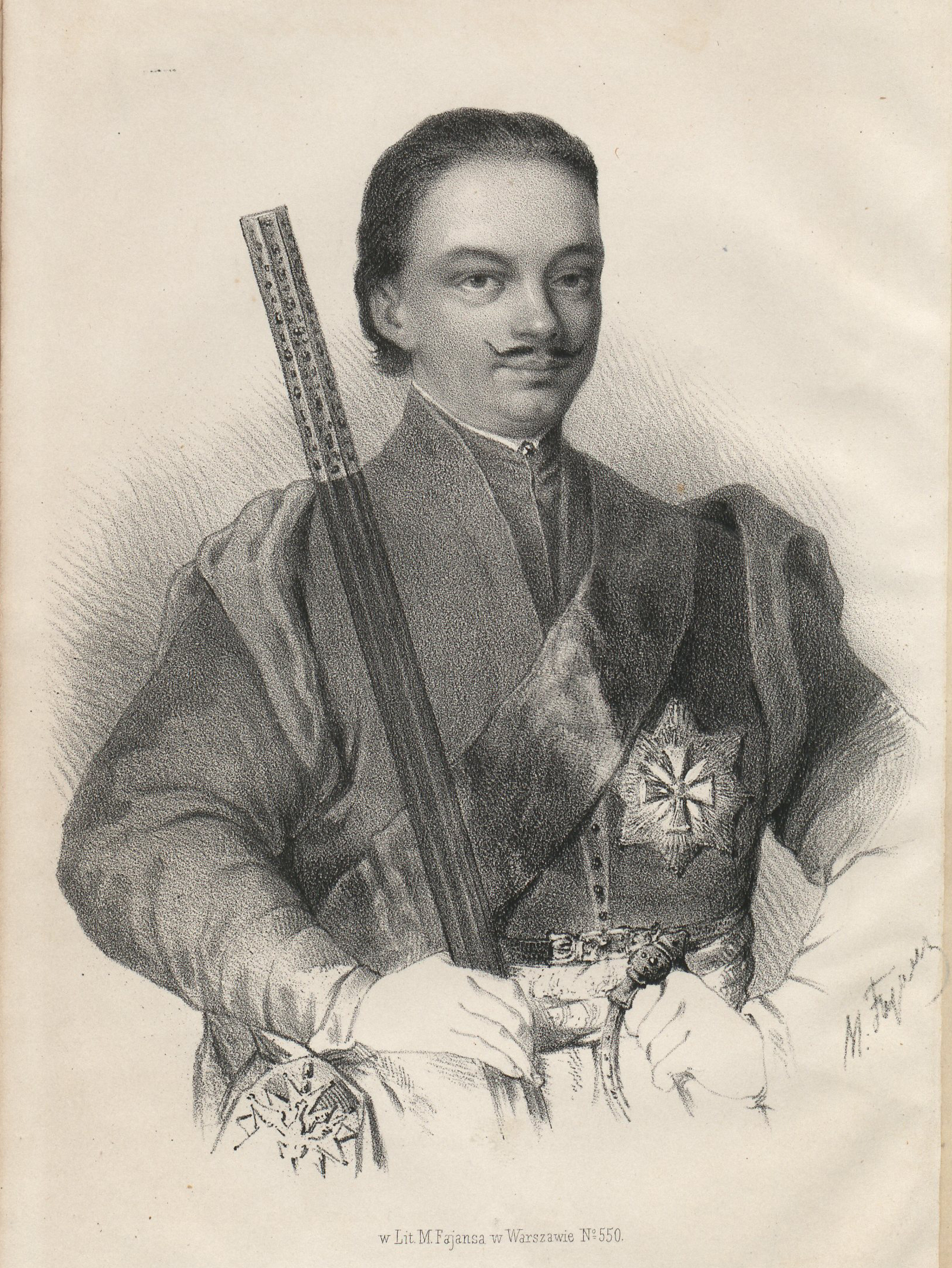 Беларуская (тарашкевіца): Партрэт Крыштапа Станіслава Завішы (Kryštap Stanisłaŭ Zaviša) гербу «Лебедзь» (1660 — 1721), дзяржаўнага дзеяча Вялікага Княства Літоўскага, ваяводы менскага, пісьменьніка-мэмуарыста.